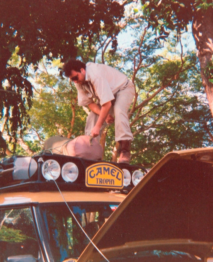 Камел Трофи Танзанија